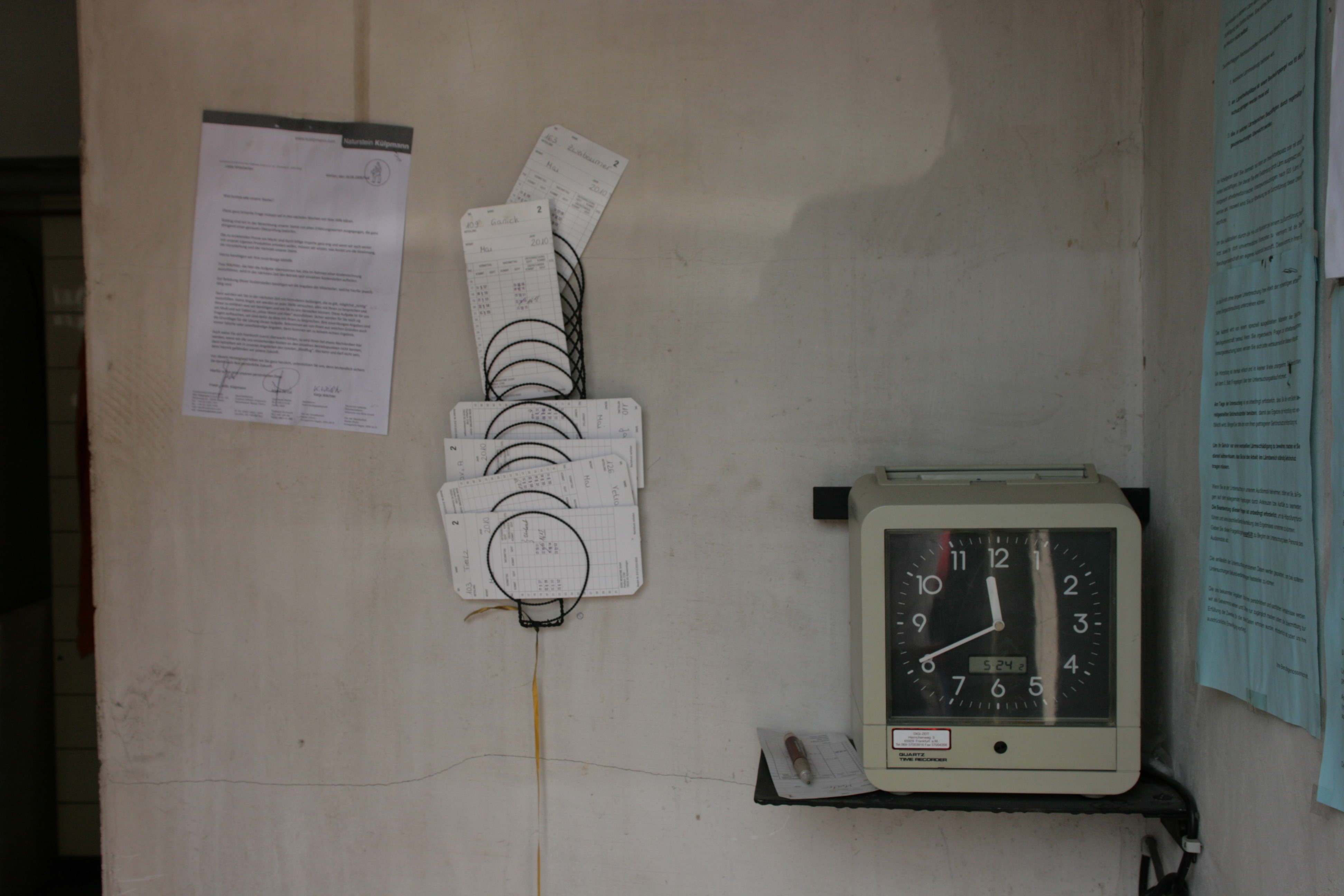 Schachtzeichen bei der ehemaligen Zeche Neuwülfingsburg, jetzt Fa. Naturstein Külpmann in Wetter (Ruhr)